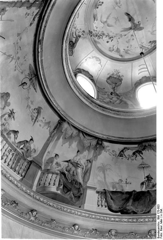 Potsdam.- Sanssouci, Kuppel des Chinesischen Teehauses